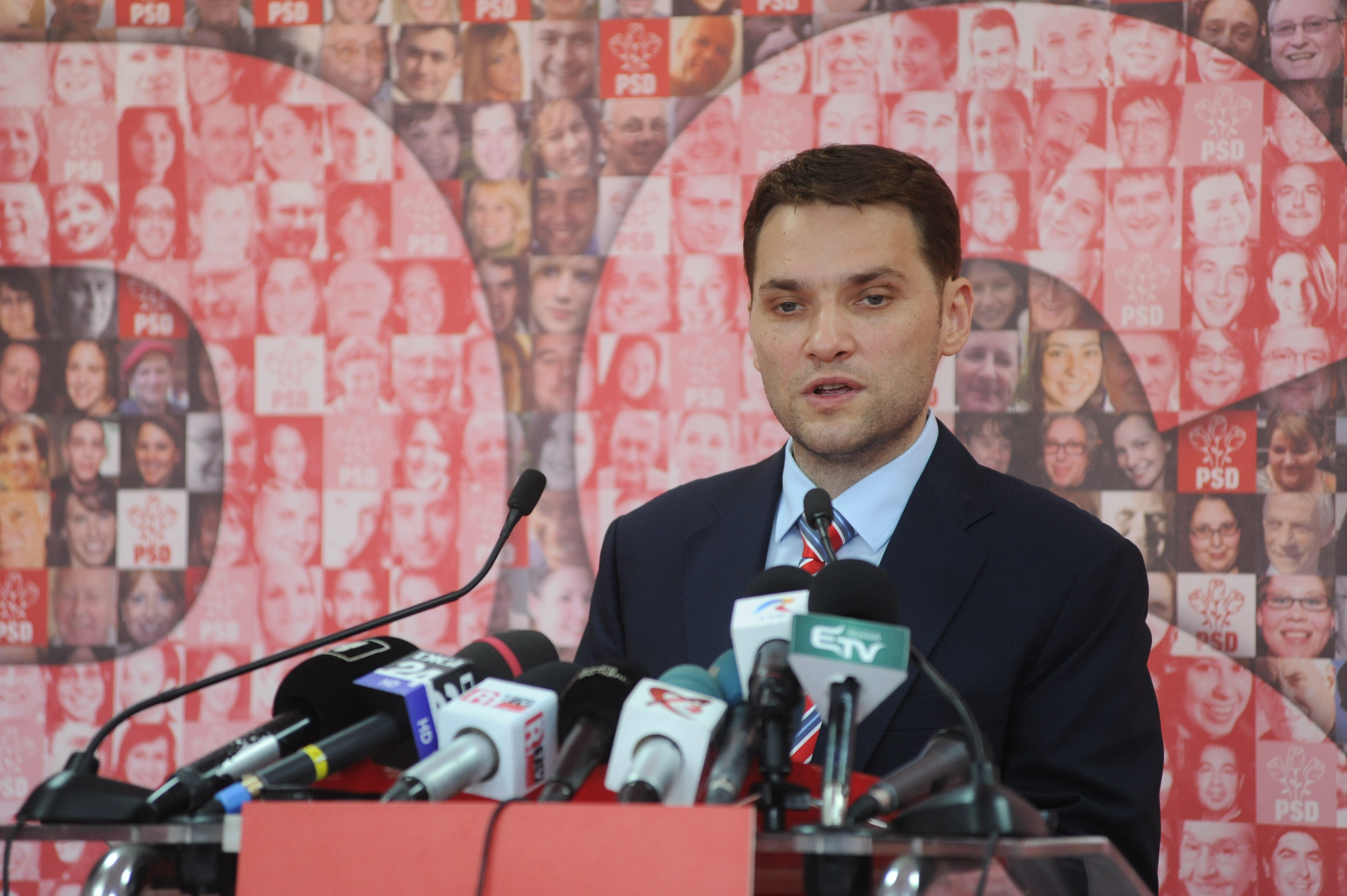 Conferinta de presa sustinuta de Dan Sova, la sediul PSD - 07.08 (1)